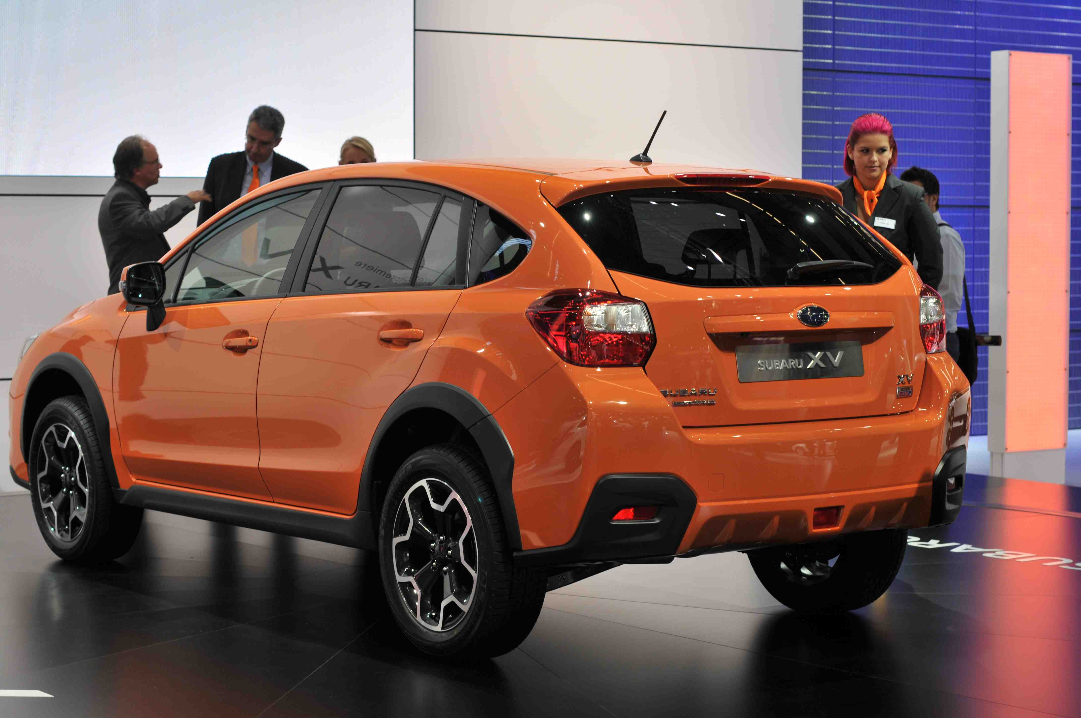 IAA 2011 - Internationale Automobilausstellung in Frankfurt/Main